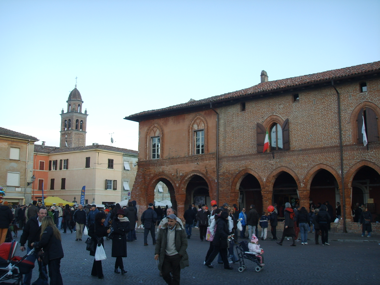 Zibello